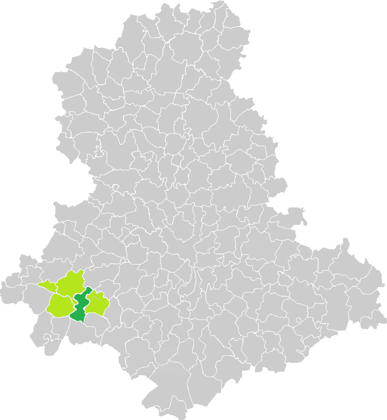 Carte de situation de la commune de Champagnac-la-Rivière (en vert foncé) dans le votre Canton (en vert clair) sur une carte des communes de la Haute-Vienne